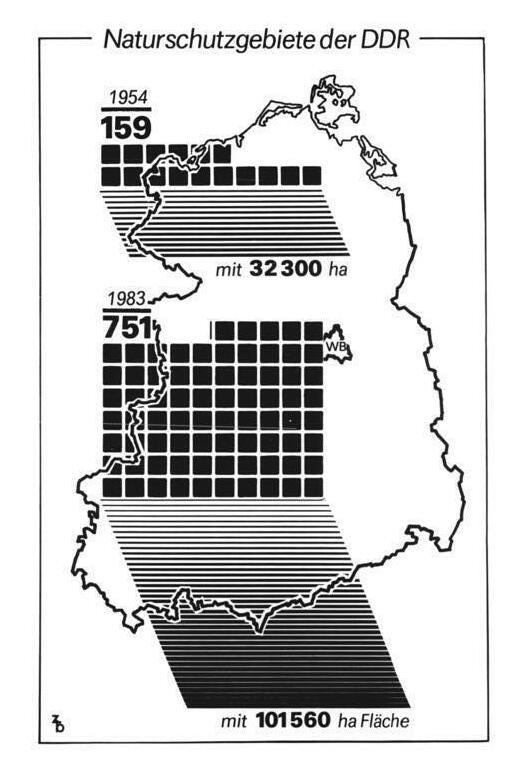 Infografik, Naturschutzgebiete der DDR ADN-ZB Grafik 8.11.1983-Naturschutzgebiete der DDR. Die Hälfte aller Naturschutzgebiete der DDR sind komplexe Schutzgebiete. Des weiteren bestehen Waldschutzgebiete, zoologische Schutzgebiete, Gewässer- und Moorschutzgebiete sowie botanische und geologische Schutzgebiete. Darüber hinaus sind rund 6 600 Hektar Fläche sogenannte Totalreservate, das heißt Gebiete, in denen keinerleit Veränderungen vorgenommen werden dürfen. Quelle: Presse-Informationen 120-83. Information added by Wikimedia users.